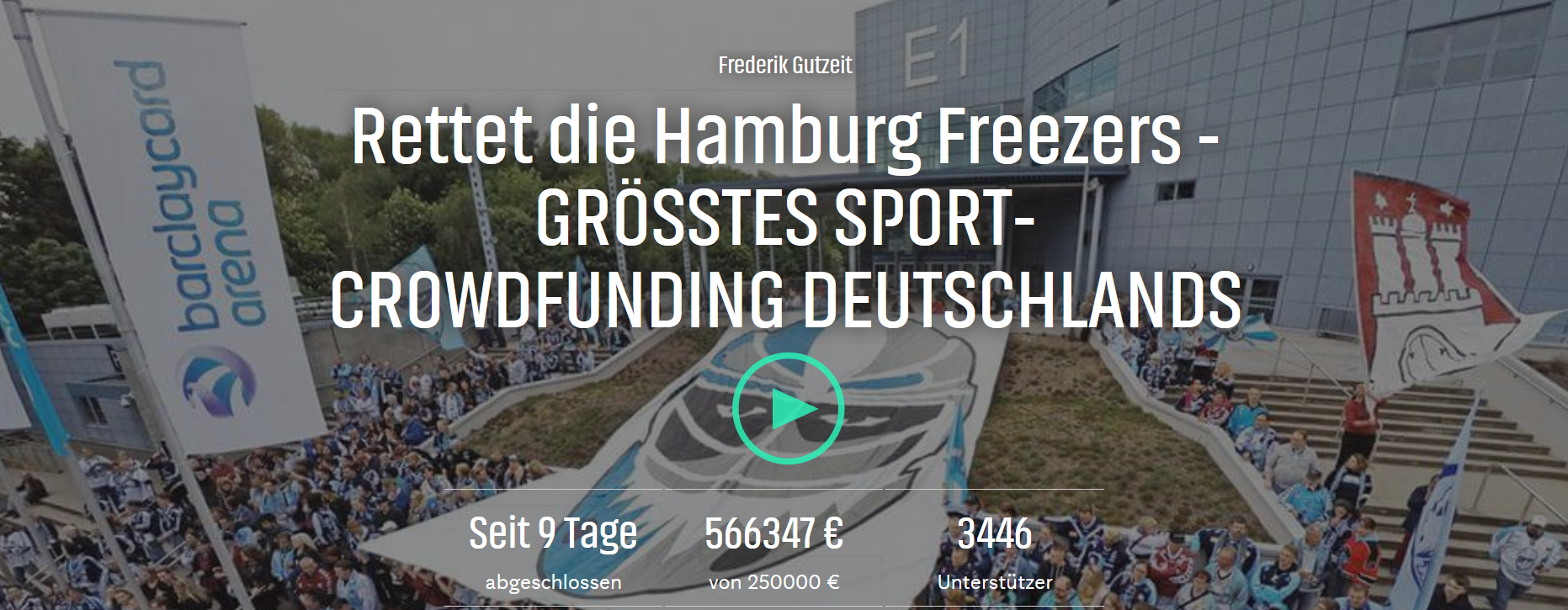 Gesammelte Spendengelder über das Crowdfunding-Projekt "Rettet die Hamburg Freezers. Es entwickelte sich innerhalb von 5 Tagen zum größten Sport-Crowdfunding deutschlands.